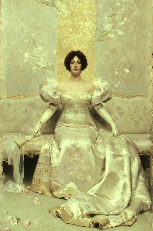 La Femmetitle QS:P1476,fr:"La Femme" label QS:Lfr,"La Femme"